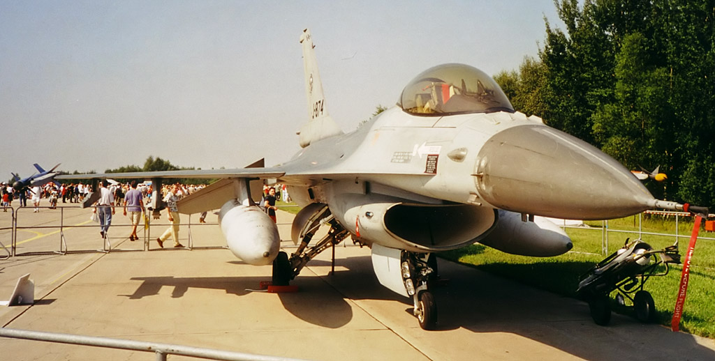 Beschreibung: F-16 Fighting Falcon in Laage